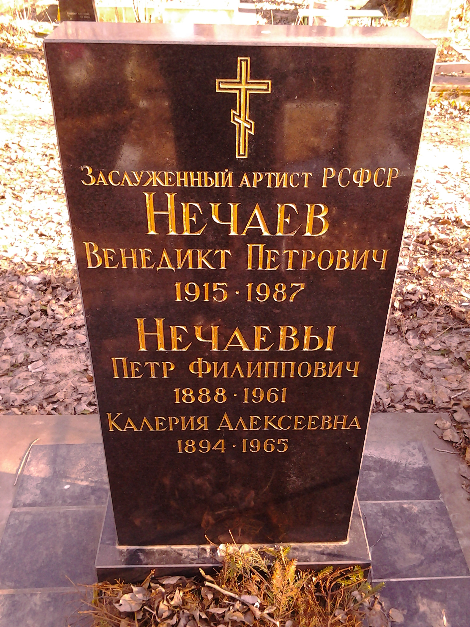 Надгробие В. П. Нечаева на Ново-Волковском кладбище Санкт-Петербурга.